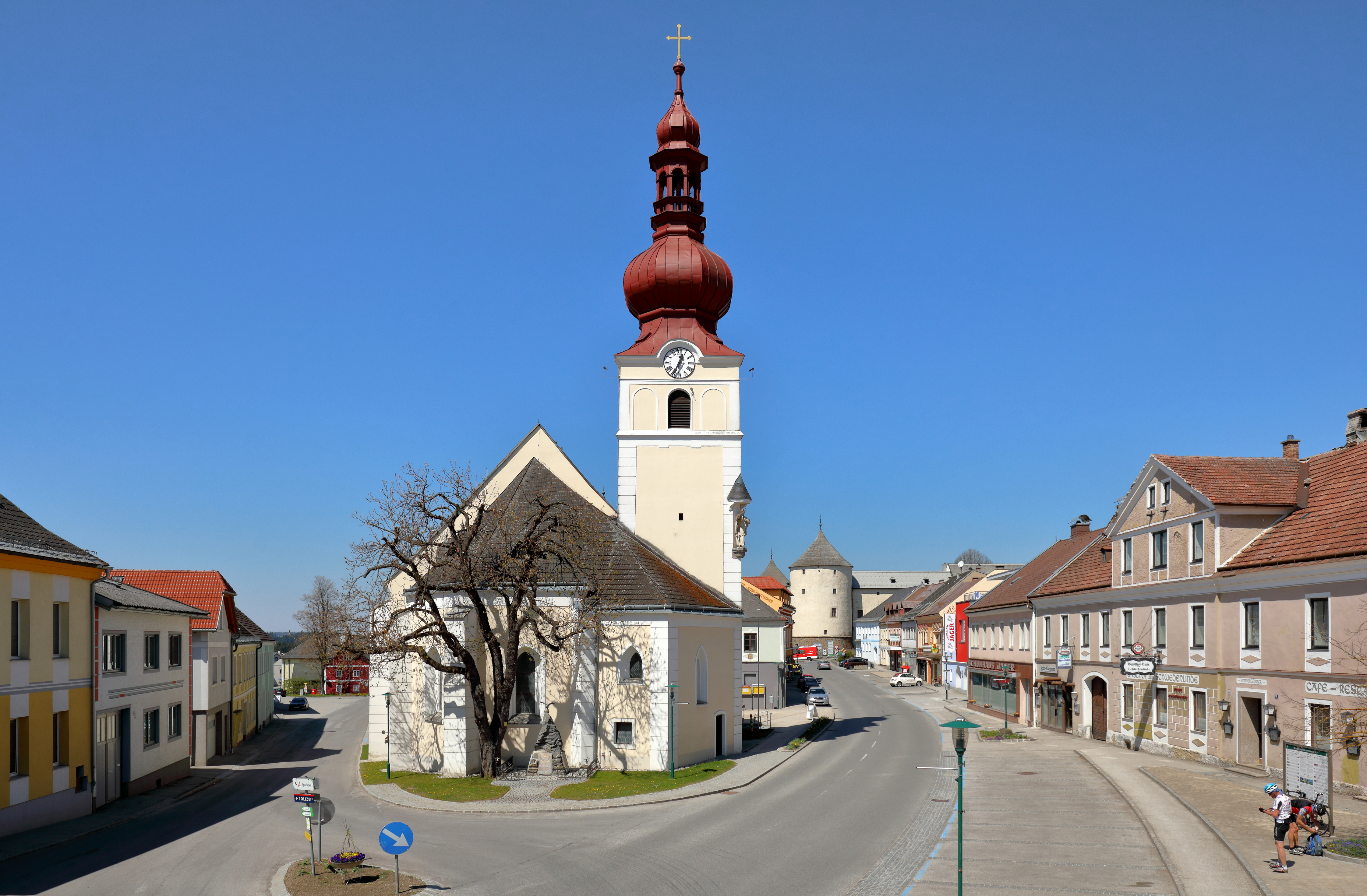 Ortszentrum der niederösterreichischen Marktgemeinde Ottenschlag mit der röm.-kath. Pfarrkirche hl. Jakobus der Ältere und rechts dahinter ein Rundturm des Schlosses Ottenschlag.